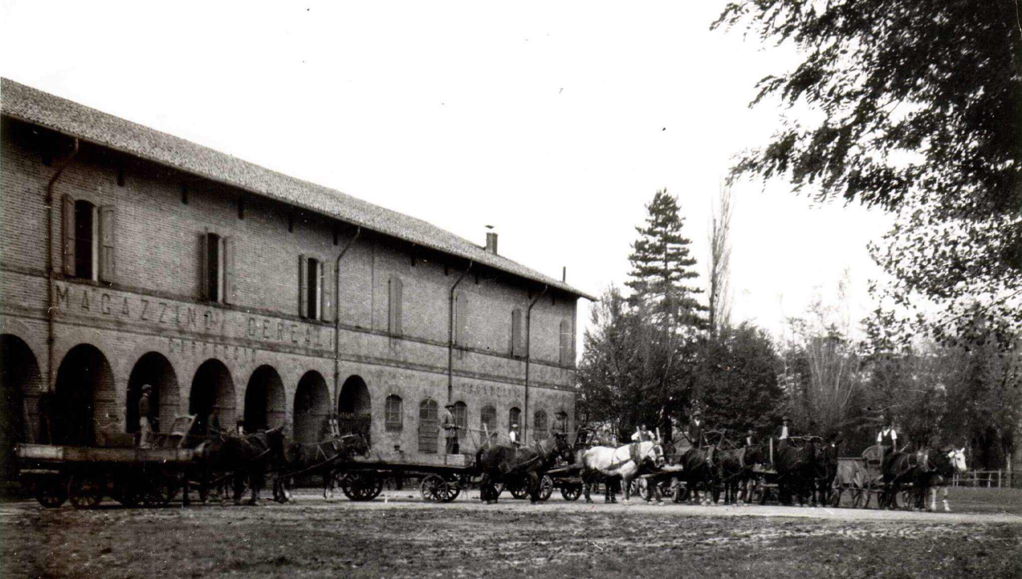 Magazzino dei cereali e deposito dei carri a San Martino Spino